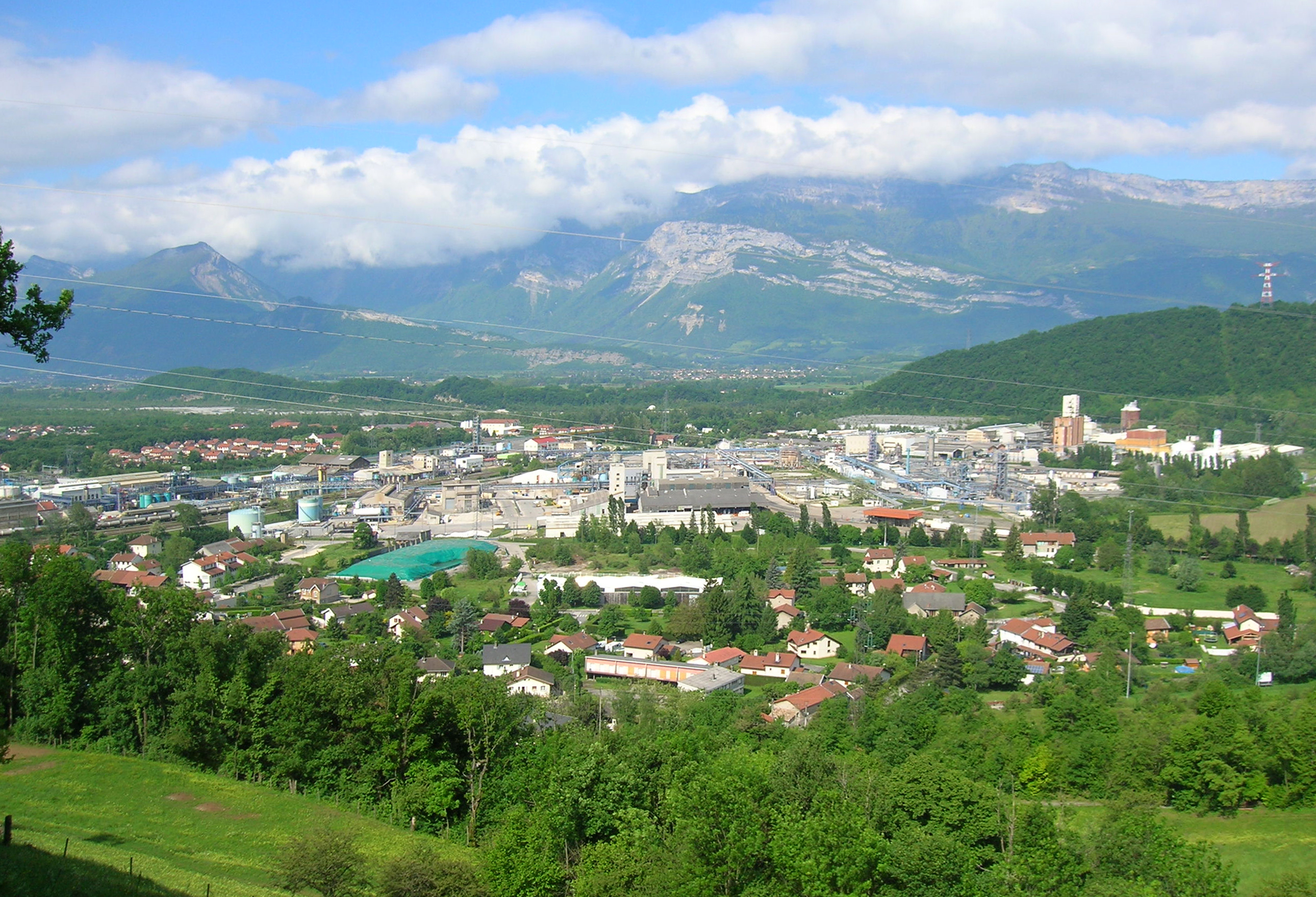 Basse Jarrie, Jarrie, Isère, AuRA, France.